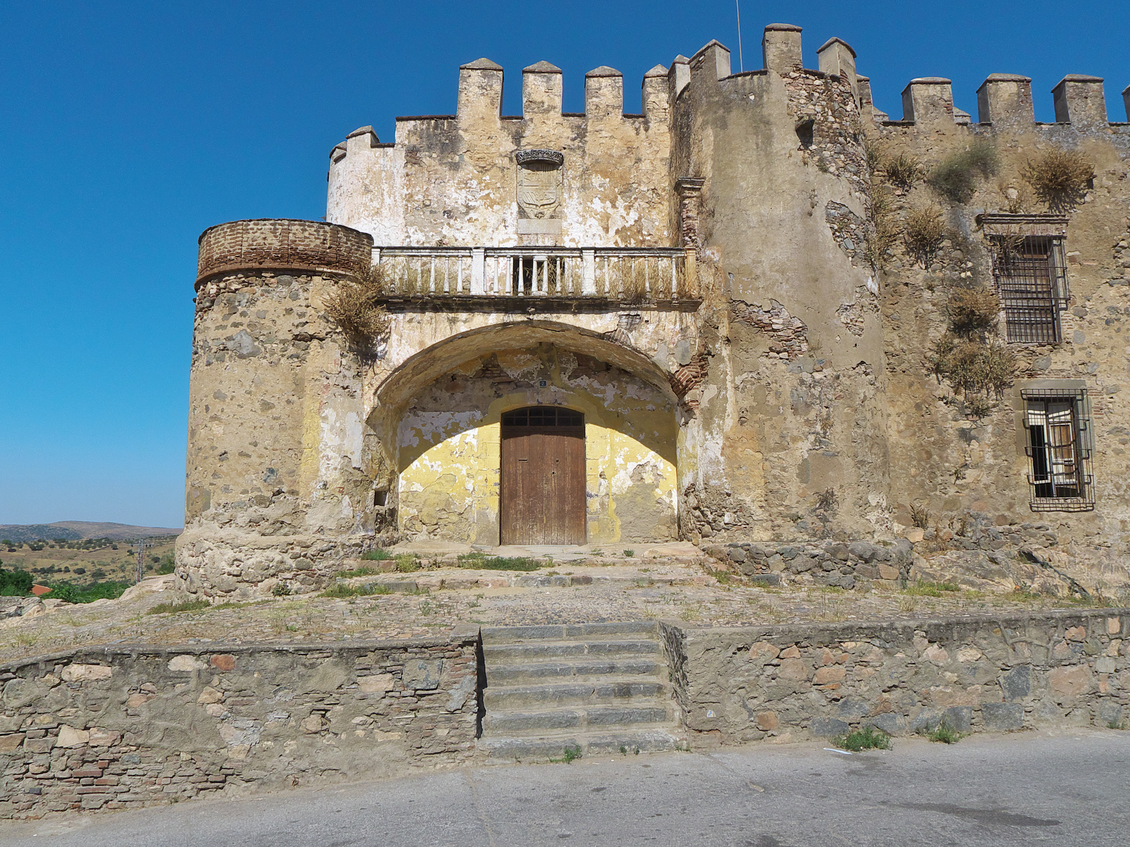 Rodrigo de Cárdenas, comendador de la Orden de Santiago, construye su casa y sede de la Encomienda de la Orden de Santiago en Valencia del Ventoso (1477-1587)